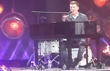 Polski piosenkarz Rafał Brzozowski.